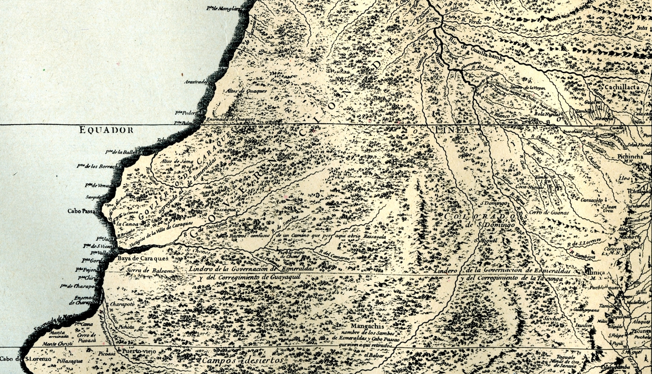 Diapositiva electronica consultada en el Fondo Digital Sección Mapoteca del Archivo Histórico del Guayas (AHG), Guayaquil - Ecuador.Consultado y compartido por el usuario J. Javier García A.